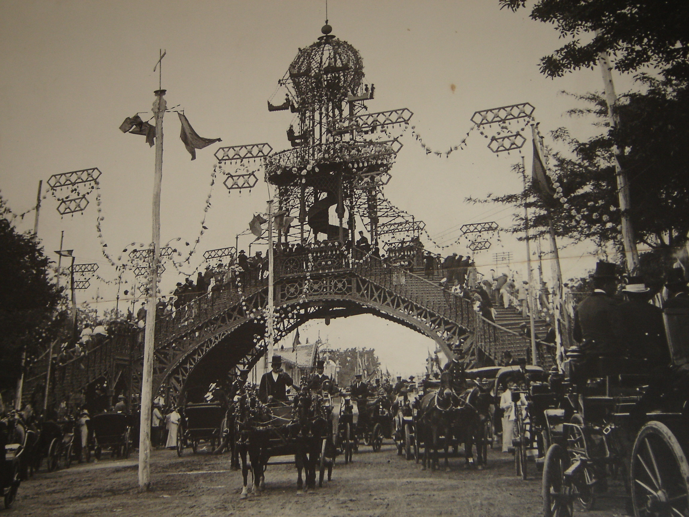 La primera portada (conocida como "La Pasarela") de la Feria de Abril de Sevilla. Foto tomada de un cuadro que cuelga del Museo de Artes y Costumbres Populares de Sevilla. Realización propia. He de destacar al respecto de esta imagen (por si existiese alguna duda) que se ha utilizado para la publicación "Guía práctica Feria de Abril 2008" realizada por el Ayuntamiento de Sevilla para las fiestas de ese año sin indicio de indicación de fuentes.